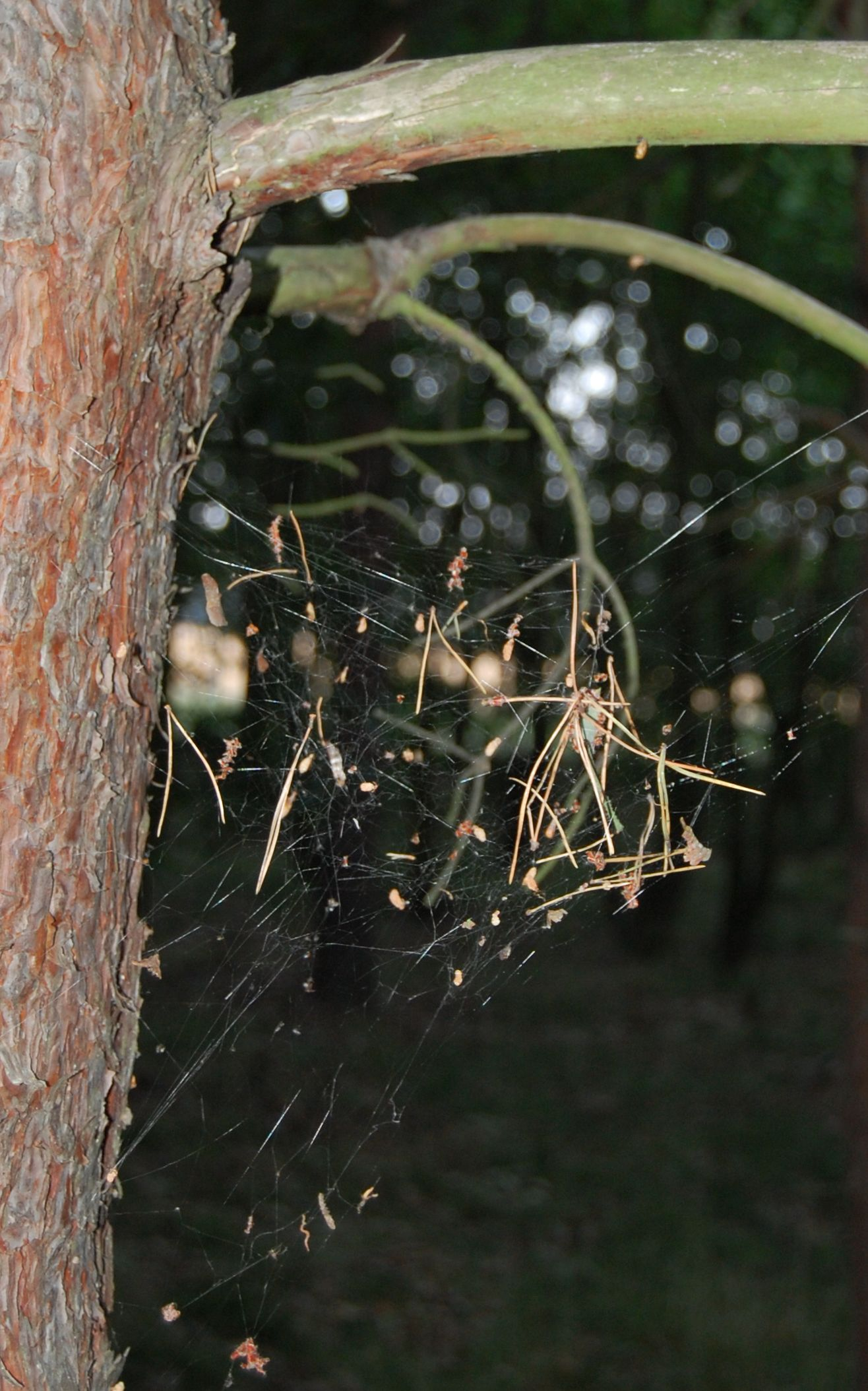 Parasteatoda lunata, Netz. Forst Jungfernheide, Berlin, Deutschland